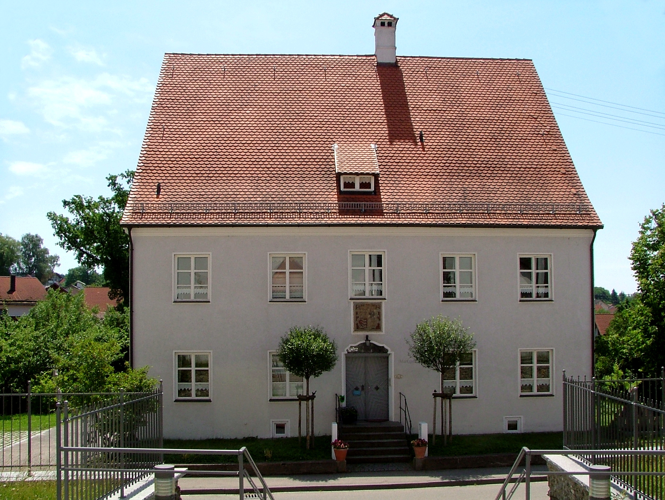 Pfarrhof Markt Rettenbach